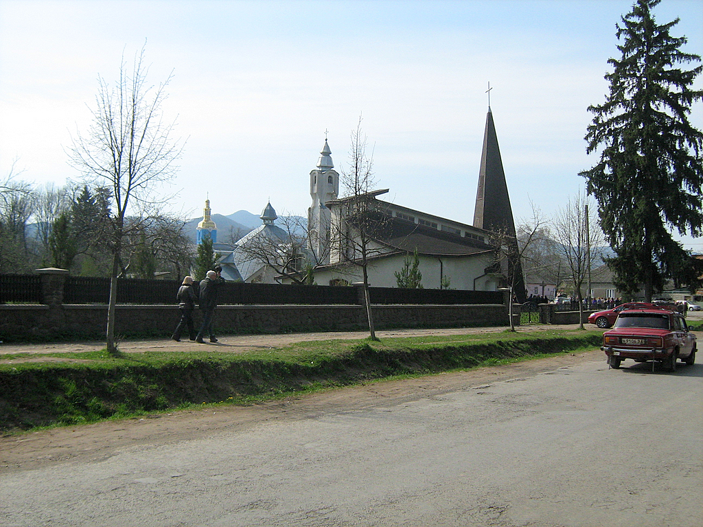 Вид с.Долгое